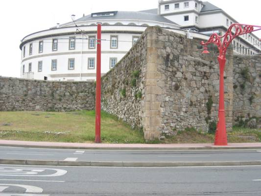 Murallas de A Coruña y Hospital Abente y Lago